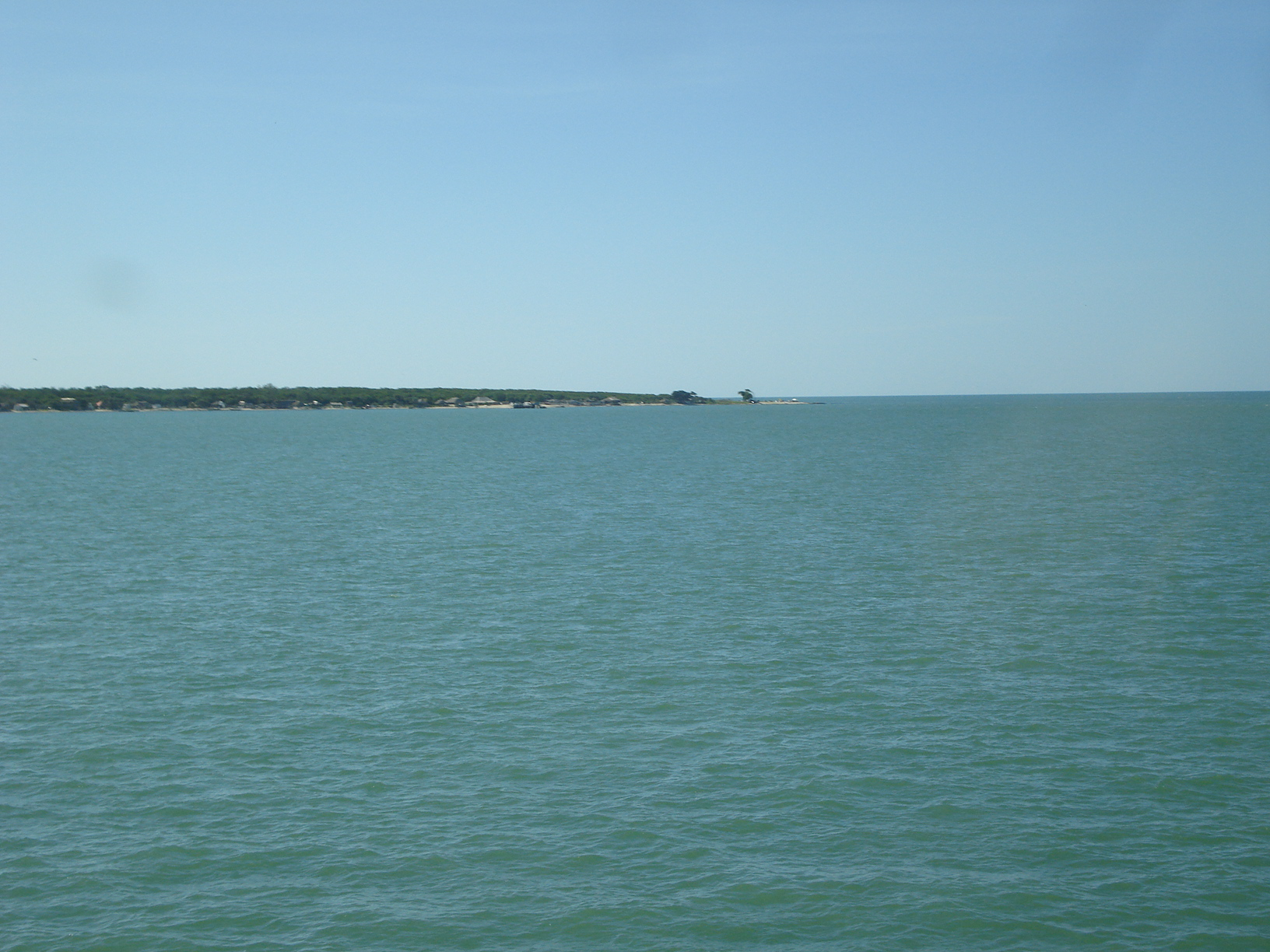 Vista desde el puente de la Unidad (Isla Aguada). Cd. del Carmen